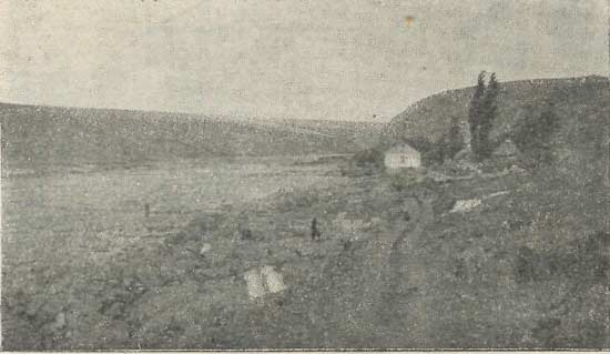 Малюнок XIX століття. Бог коло с. Казавчина на Балтщині